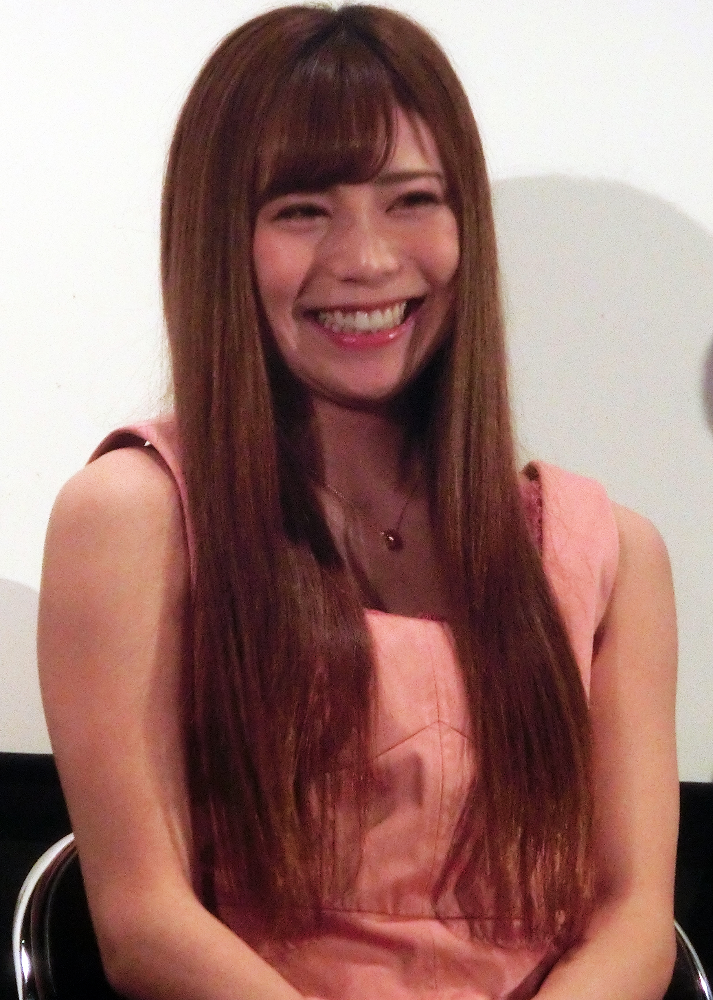 上野オークラ劇場2019年8月11日舞台挨拶